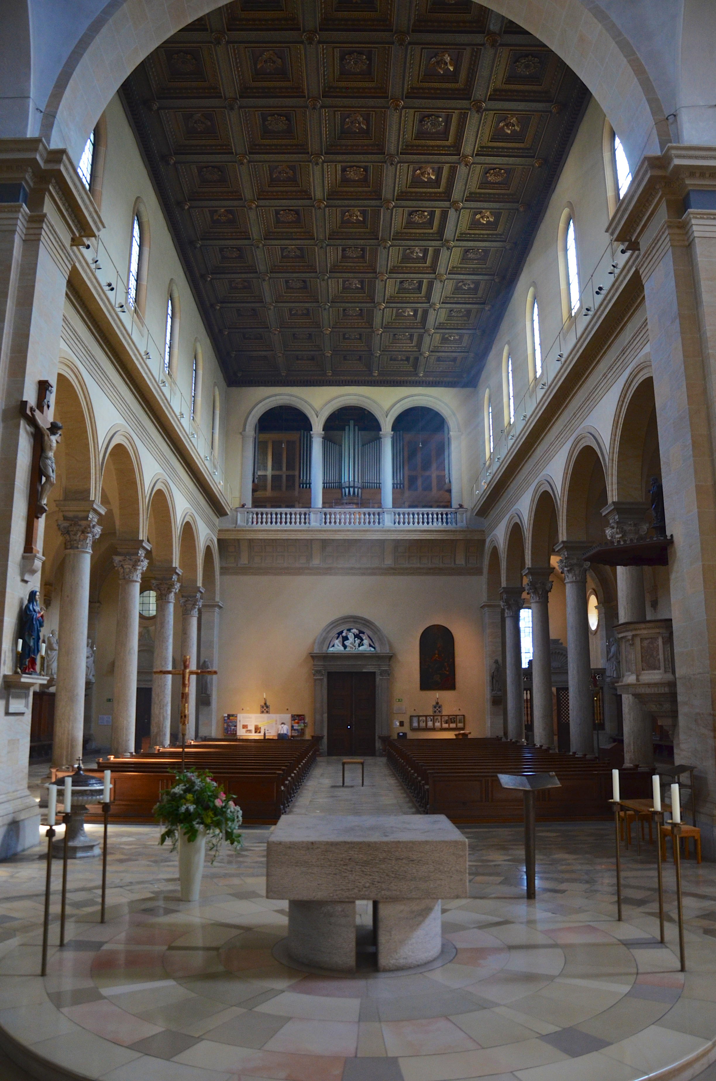 Pfarrkirche Sankt Ursula in München Schwabing am Kaiserplatz 1